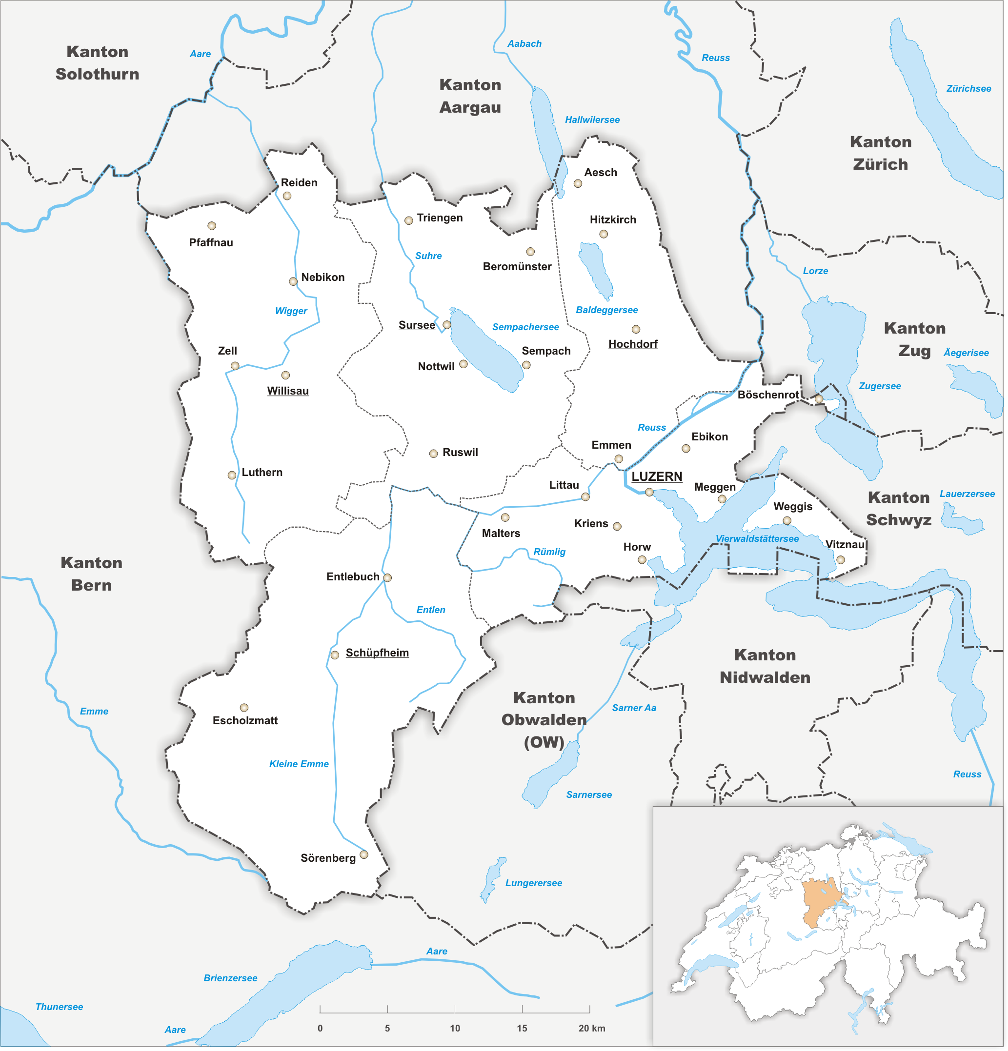 Karte des Kanton Luzern.